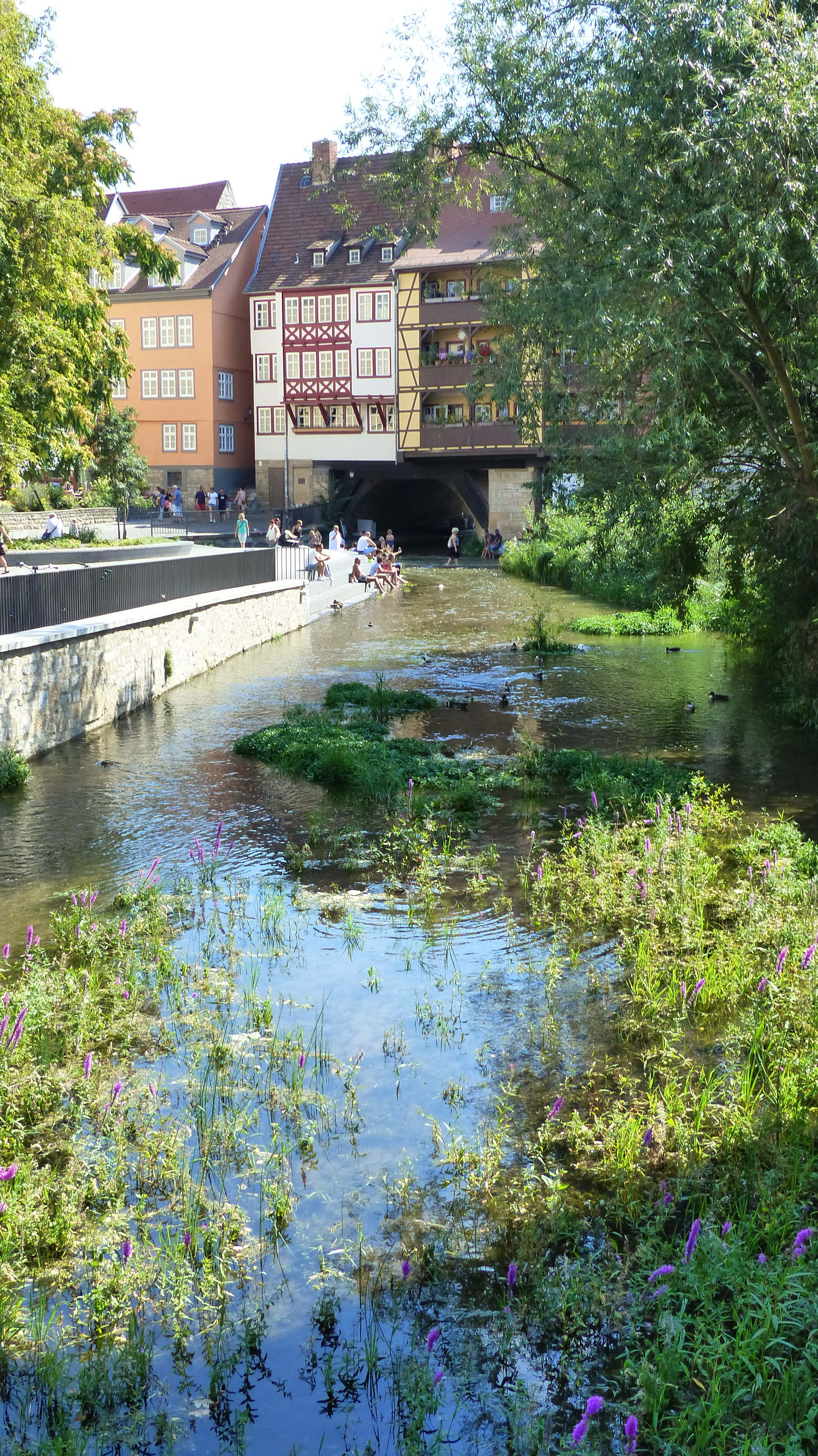 Krämerbrücke in der Altstadt von Erfurt